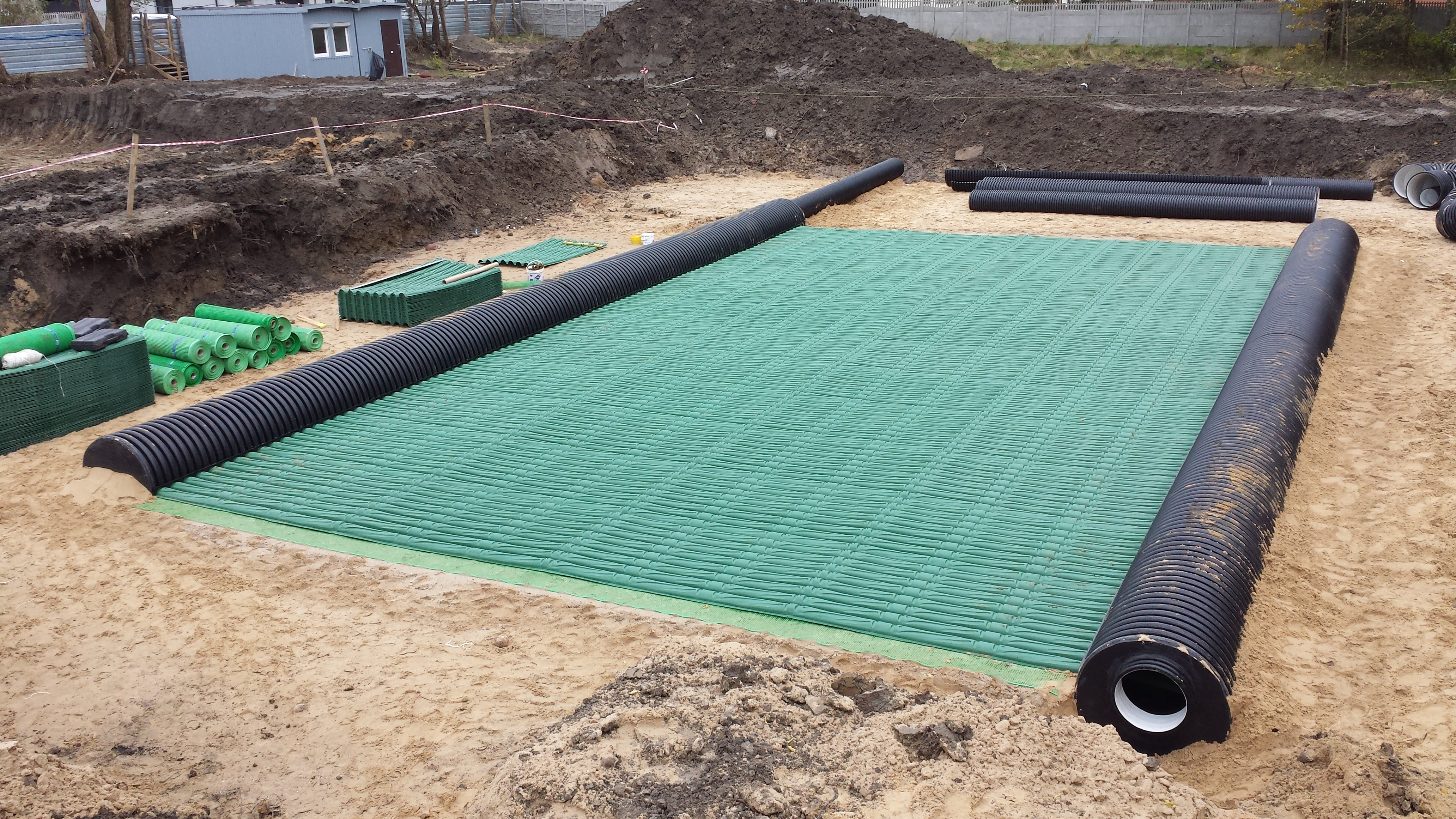 GWC GEOSTRONG ułożony pod płytą fundamentową. Wymiennik przygotowany do wykonania pod płytą fundamentową, jest też wersja montażu w obrysie fundamentów bądź poza budynkiem.